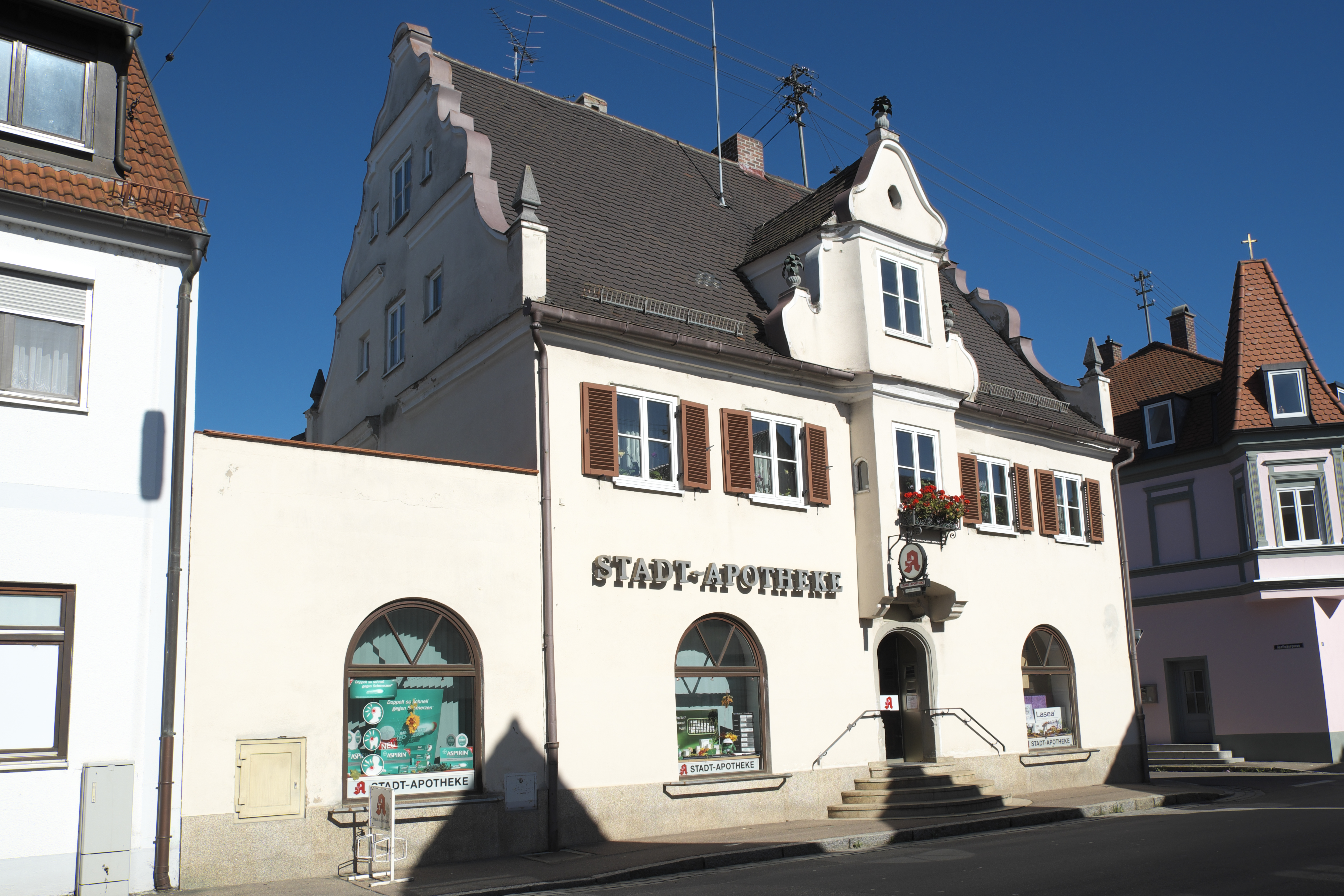 Stadtapotheke, Herzogin-Anna-Straße 9, in Höchstädt im Landkreis Dillingen an der Donau (Bayern)